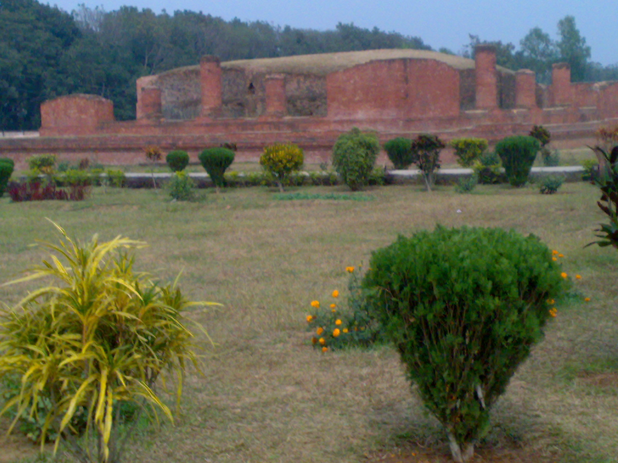 শালবন বিহার